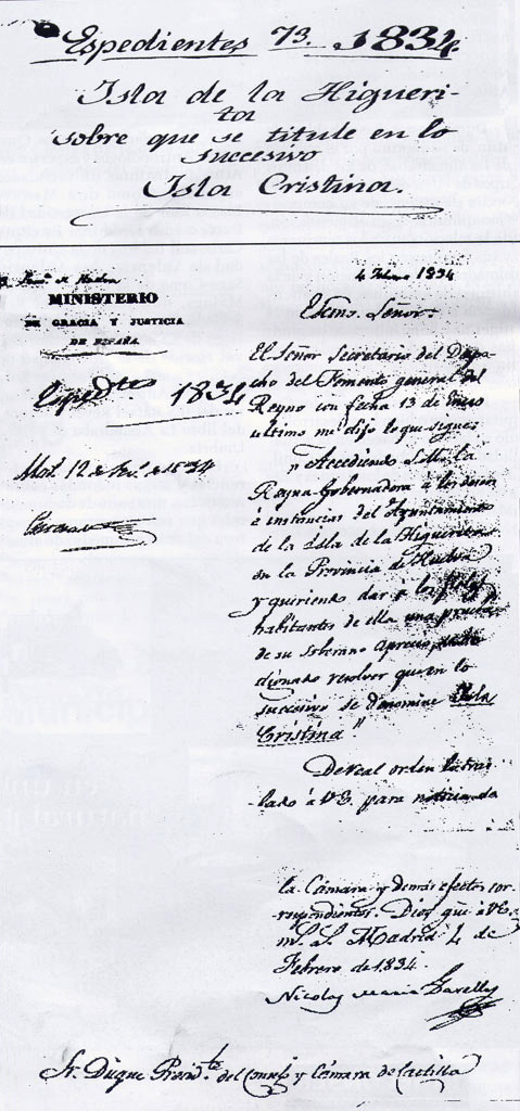 Acta por la que se autoriza el cambio de nombre de La Higuerita por el de Isla Cristina